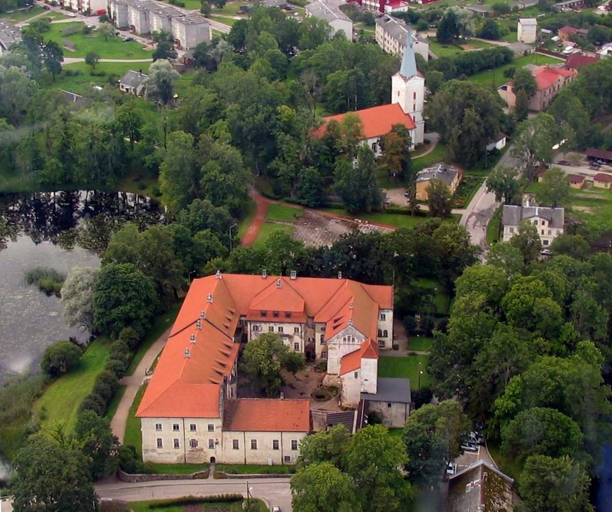 Dundaga castle